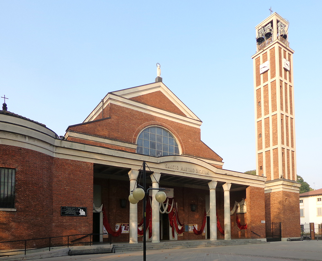 Cusano Milanino, chiesa parrocchiale di San Martino e L’Immacolata.